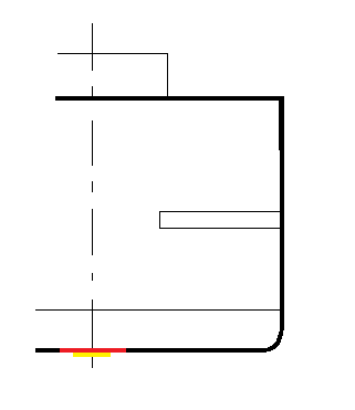 Schematischer Querschnitt mit Kielgang (rot) und Doppelung (gelb)